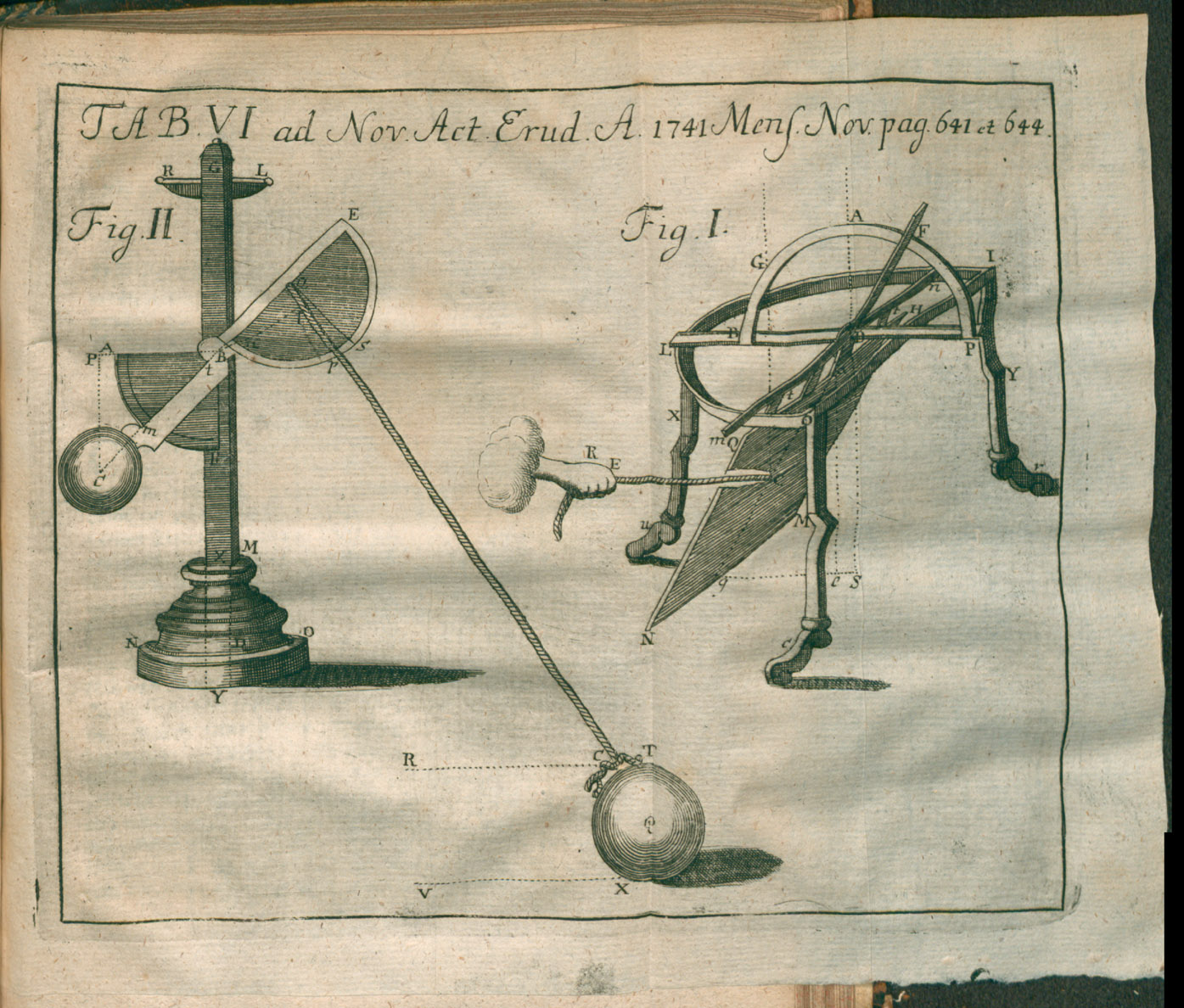 Illustration